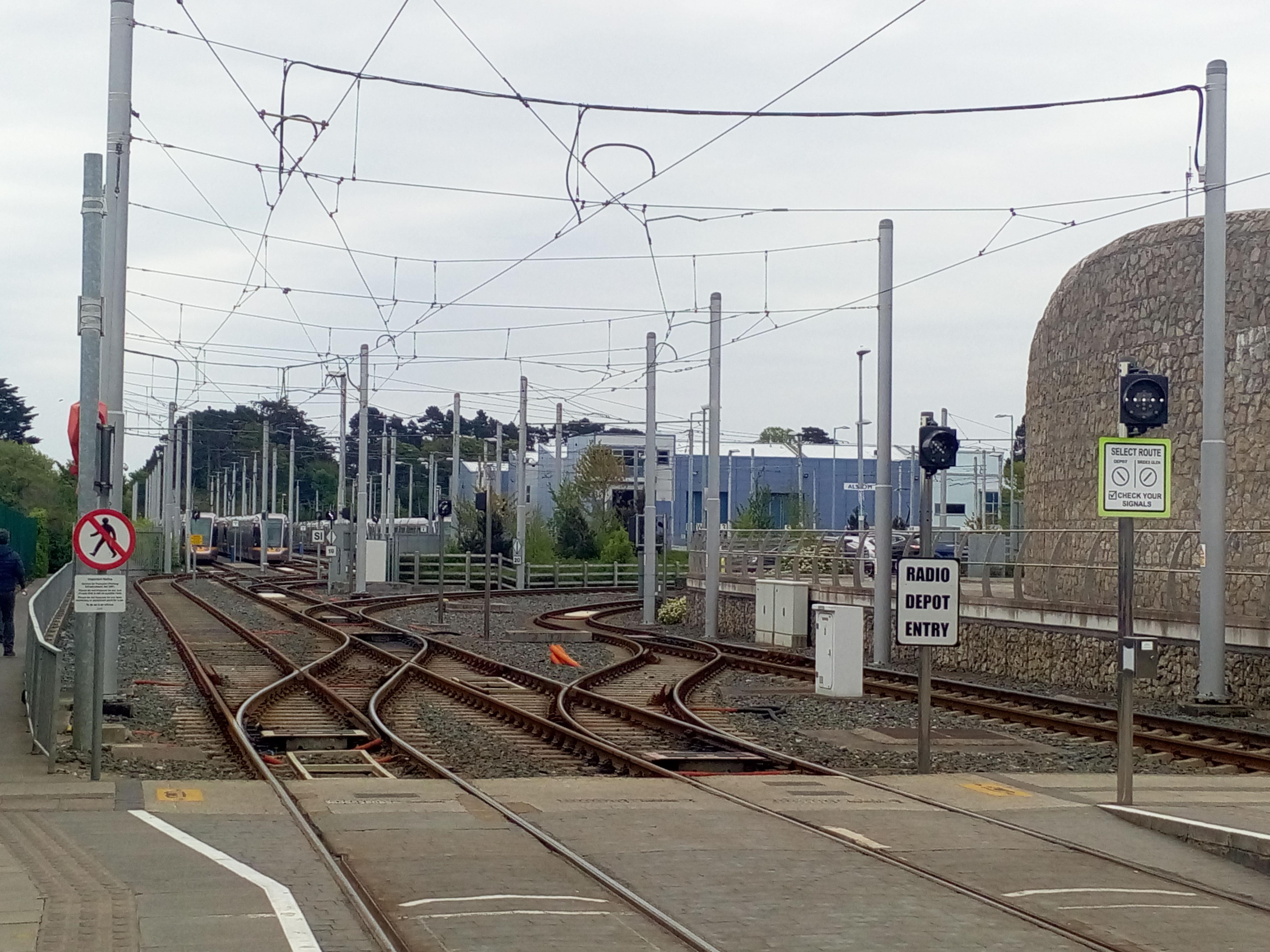 都柏林轻轨桑迪福德车场以及绿线Bride's Glen延伸线岔口